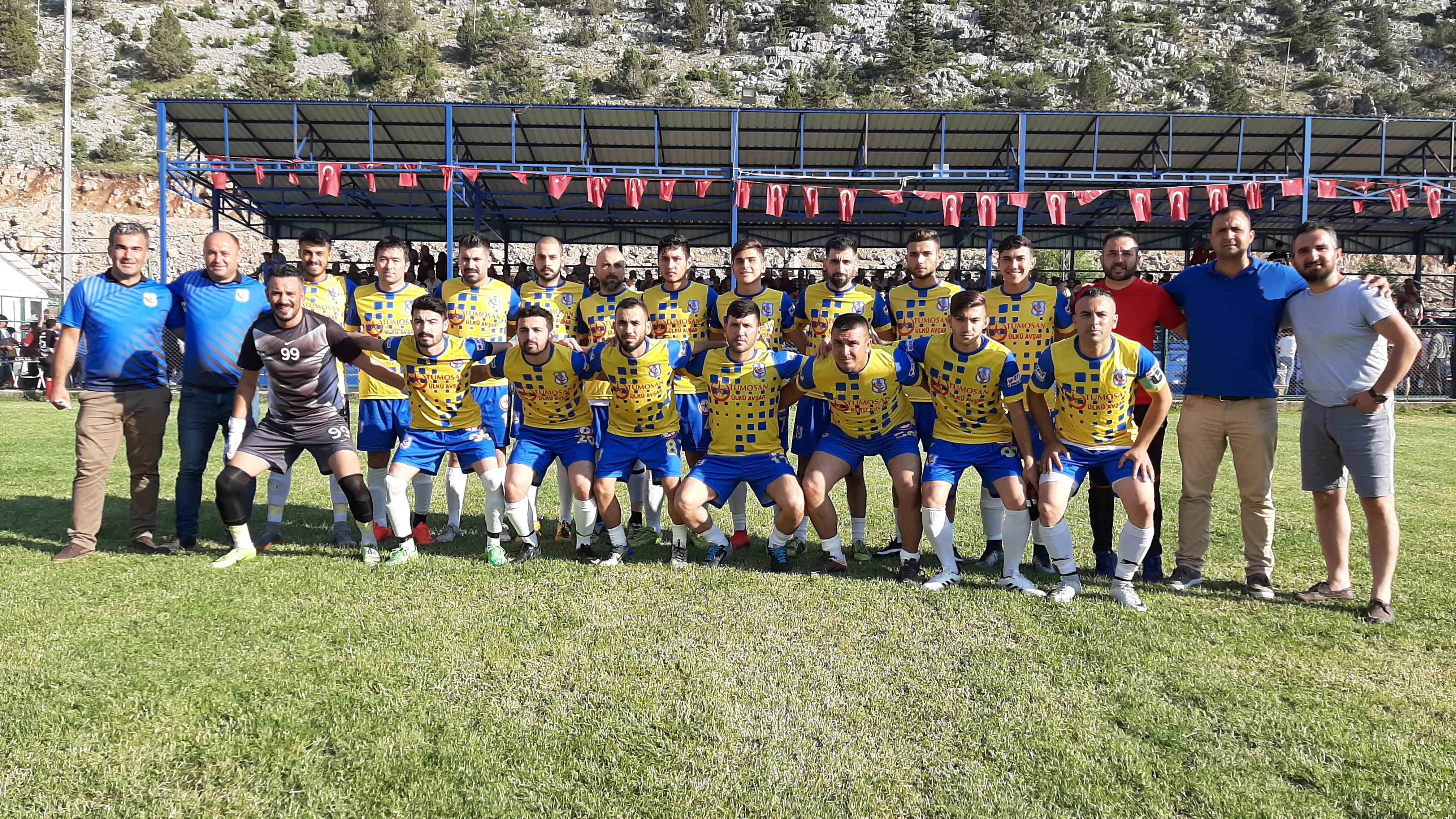 Çakallıspor 2019 kadrosu